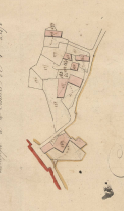 Barri del nord de Vilanova de les Escaldes, del terme d'Angostrina i Vilanova de les Escaldes en el Cadastre Napoleònic del 1812 (Arxius Departamentals dels Pirineus Orientals)